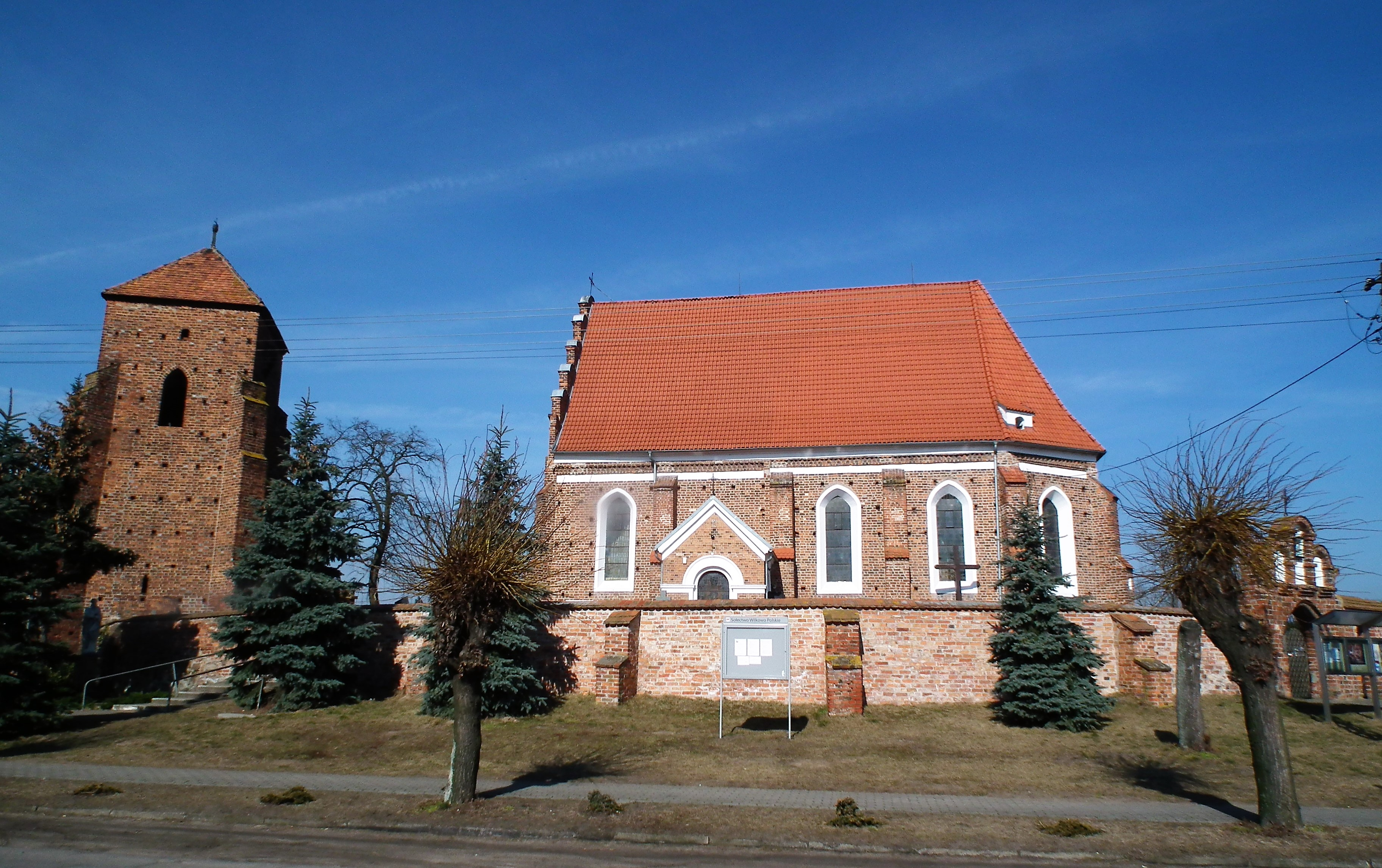 Kościół św. Jadwigi w Wilkowie Polskim.